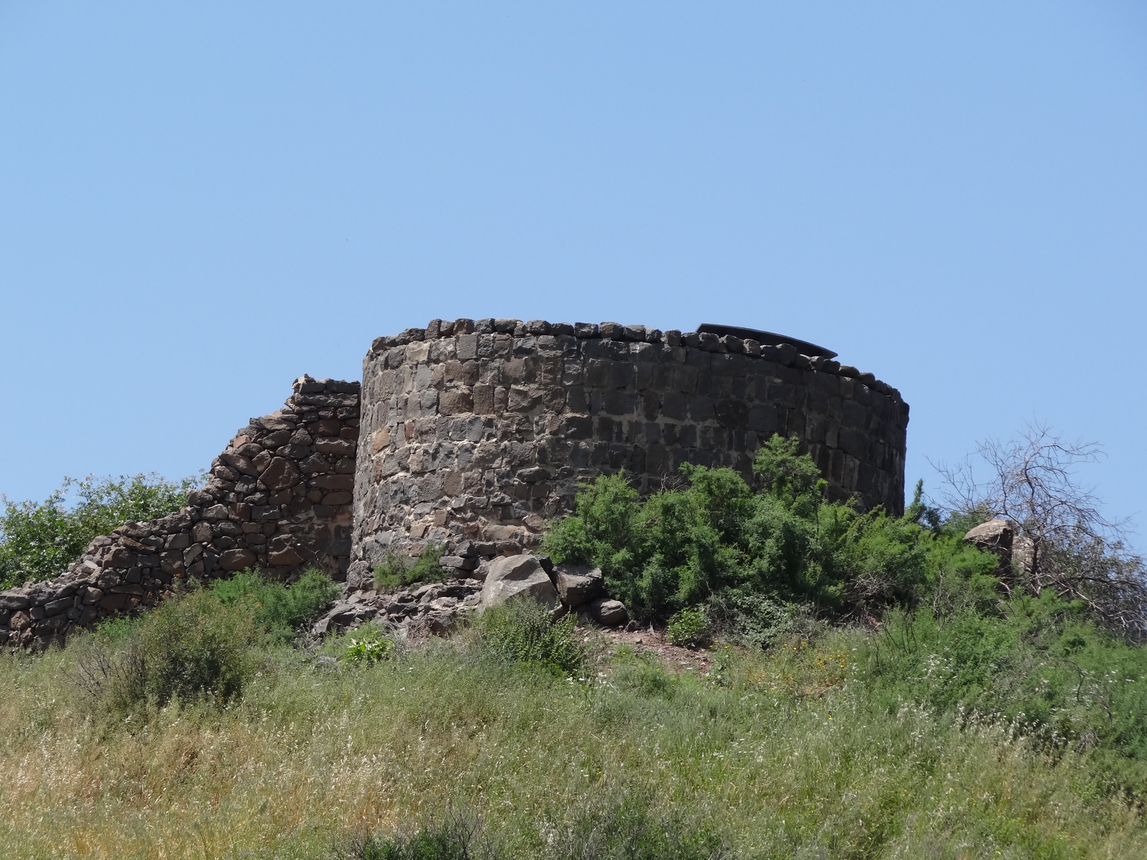 Gamla archaeology site אתר ארכאולוגי גמלא ברמת הגולן המגדל העגול